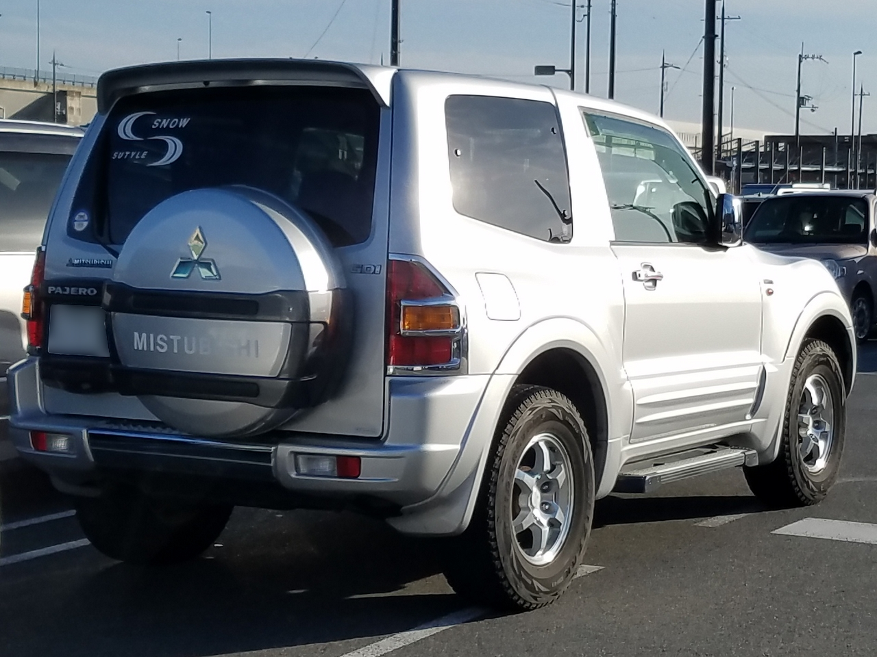 パジェロ ショート エクシード（前期型）